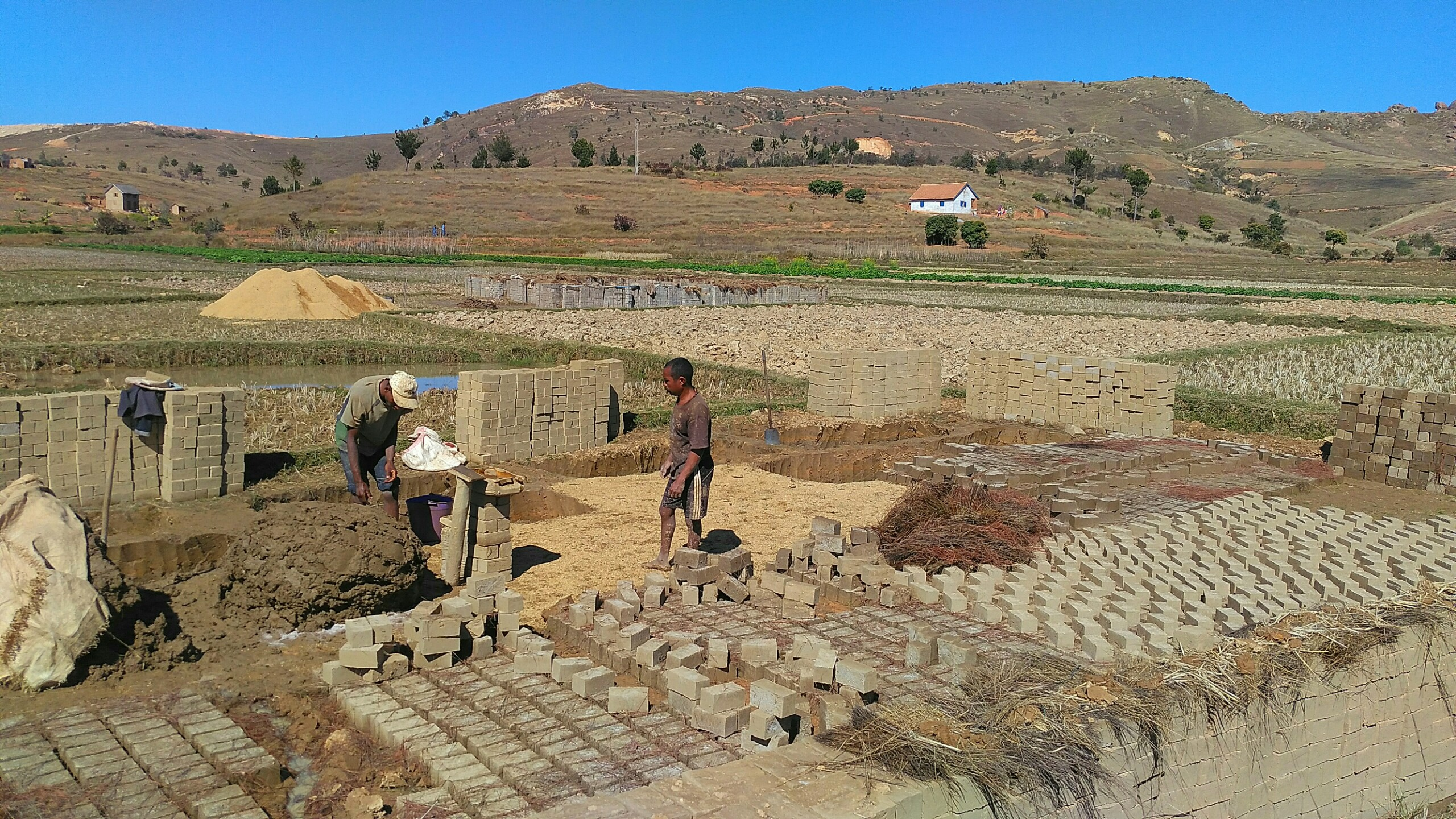 Fabrication artisanale de briques à Madagascar.